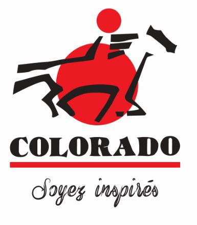 Logo de l'entreprise